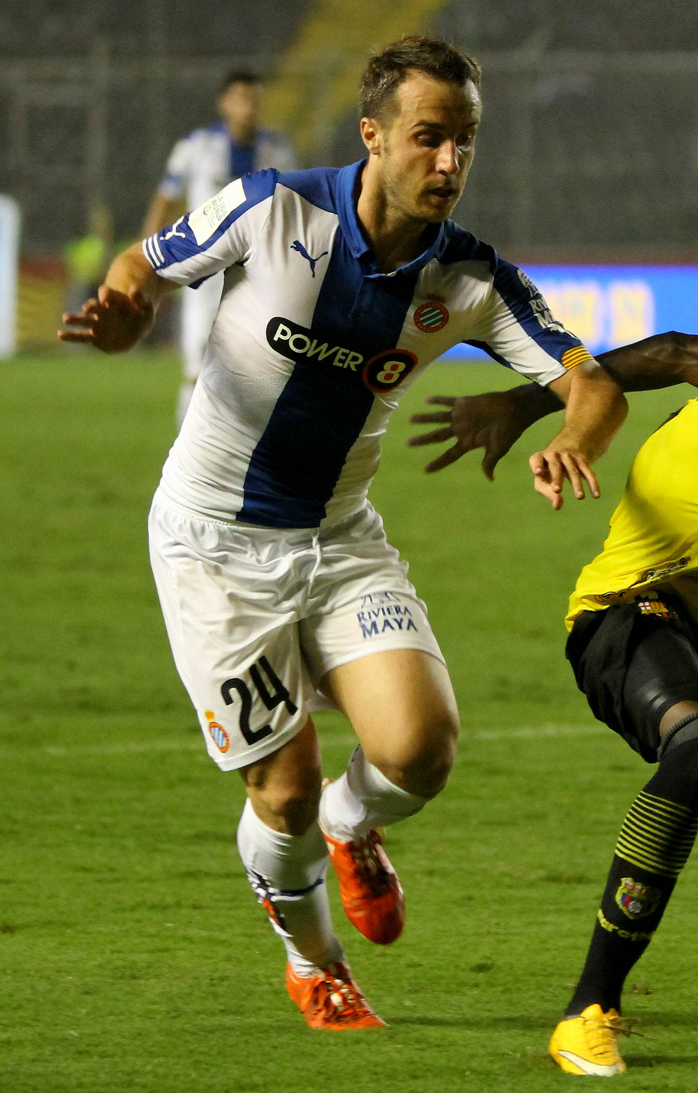 Guayaquil, 28 de may (Andes).-Barcelona de Ecuador gana 1x0 al Spanyol en el partido por la Copa Euroamericana que se disputo en el estadio Monumental Foto: César Muñoz/Andes